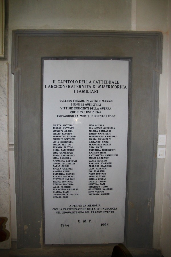 Lapide in memoria dei caduti della strage di san miniato dentro il duomo